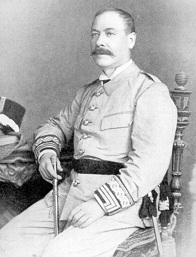 Retrato fotográfico del general español José Toral y Velázquez